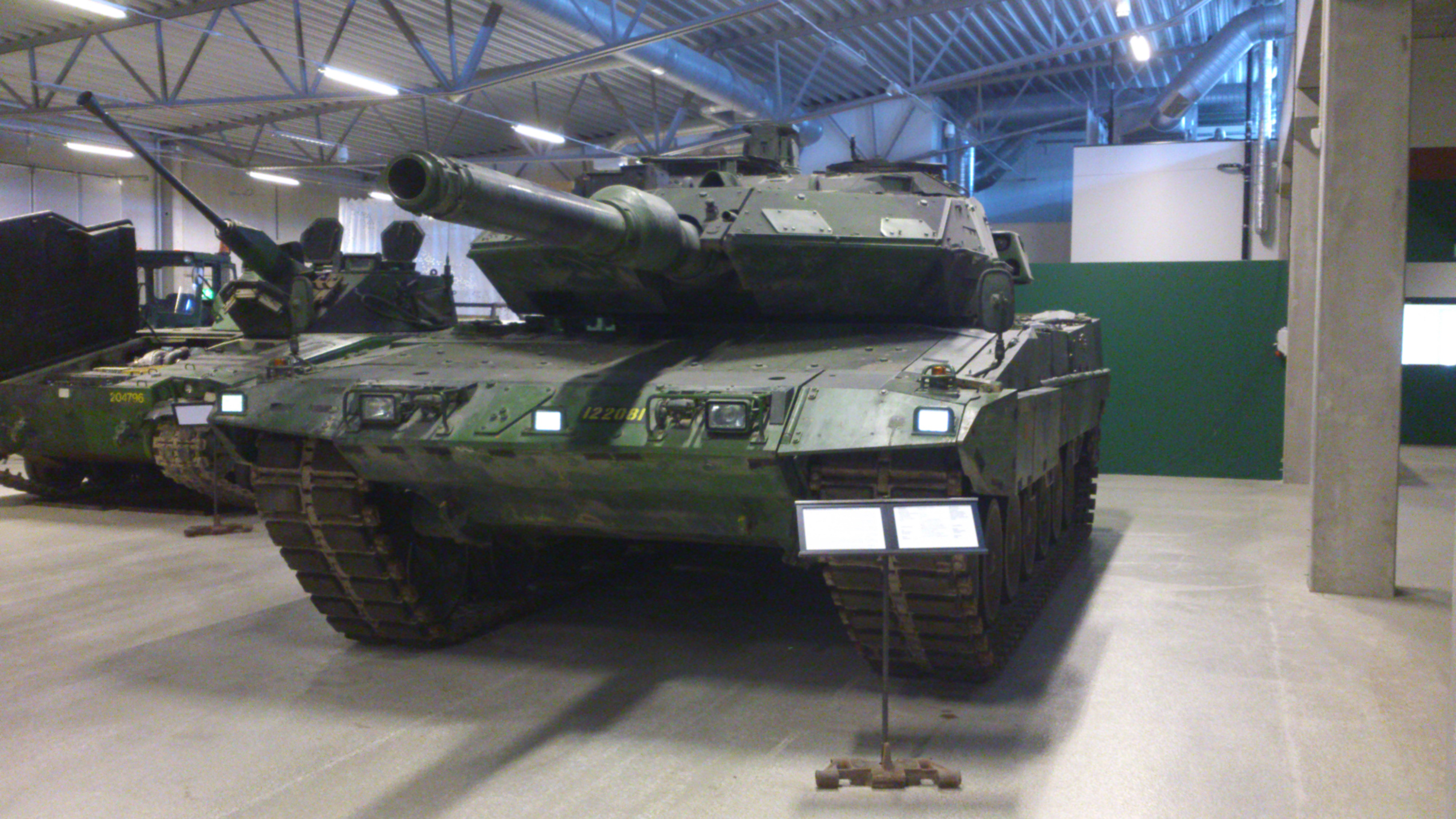 Stridsvagn 122 på Försvarsfordonsmuseet Arsenalen i Strängnäs